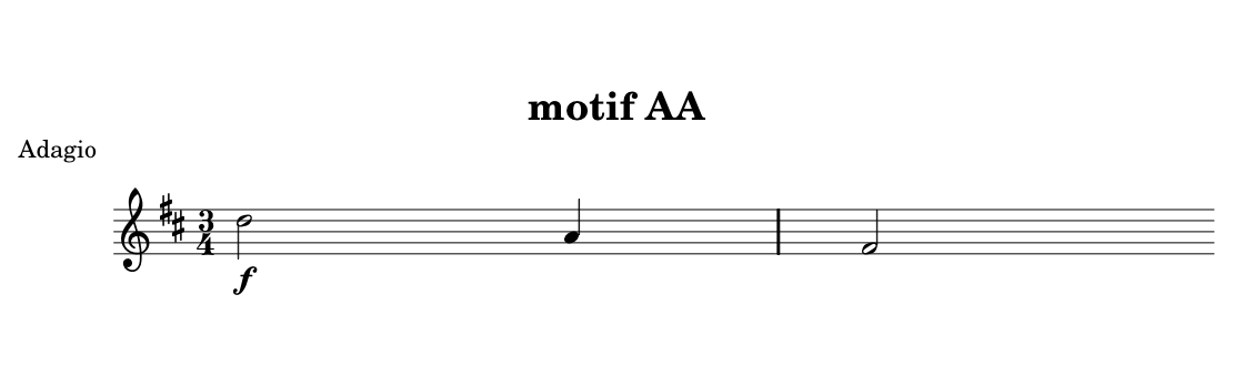 motif AA